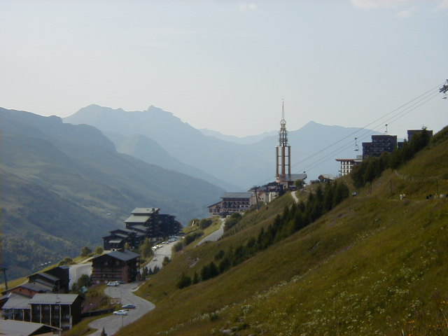 Les Menuires